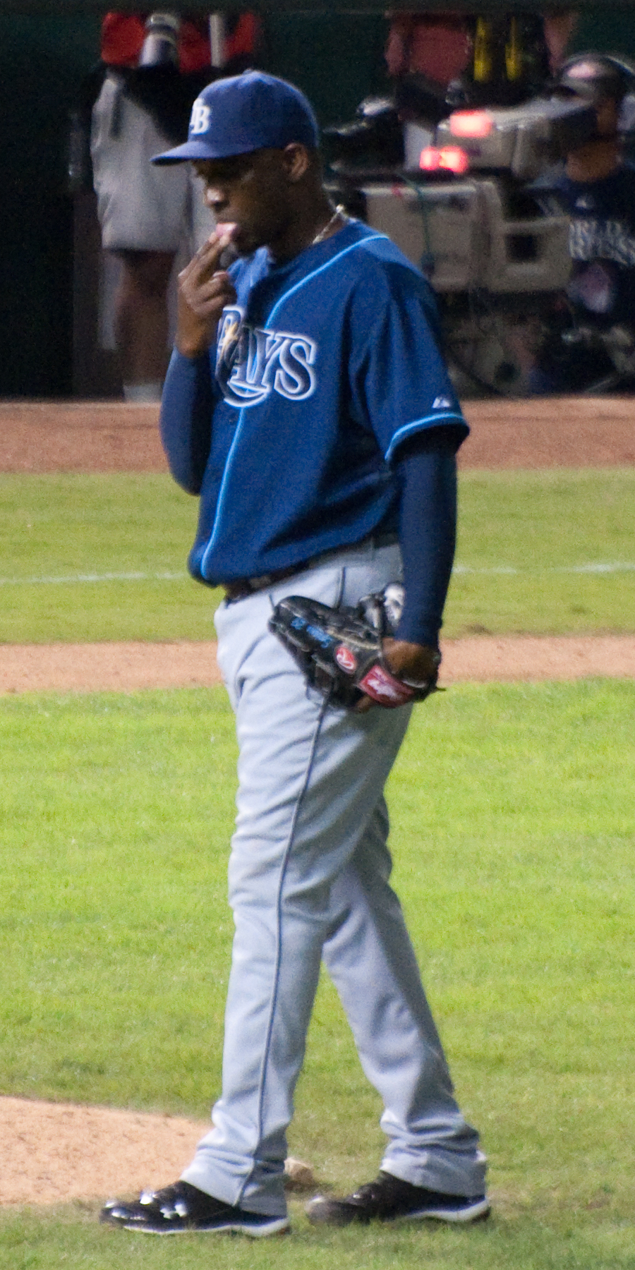 Rafael Soriano